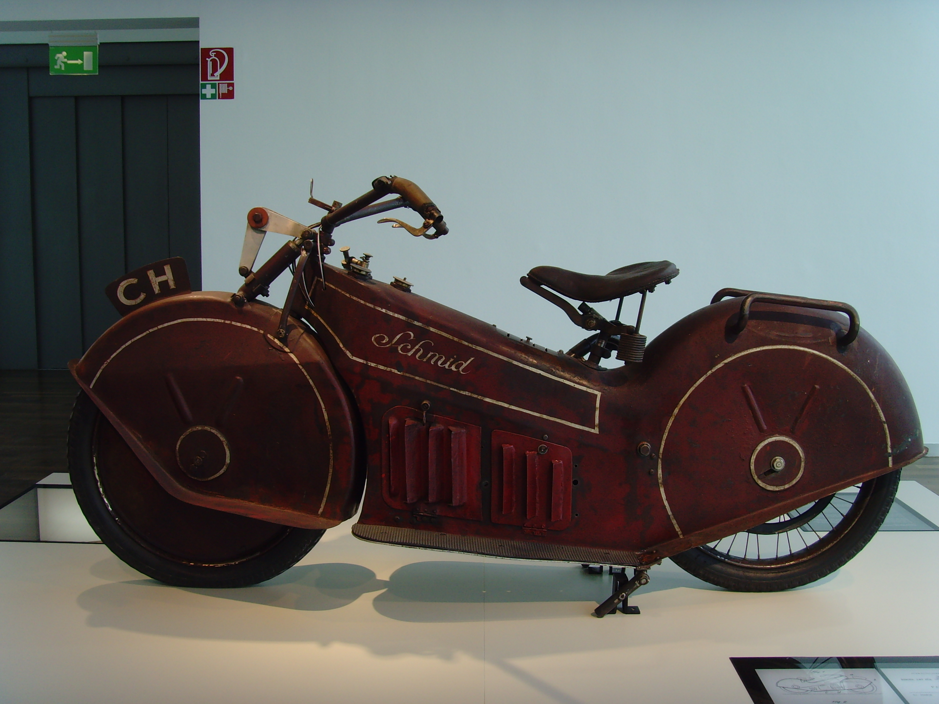 Autostadt Wolfsburg - motorrad ikonen - Schmid 1923